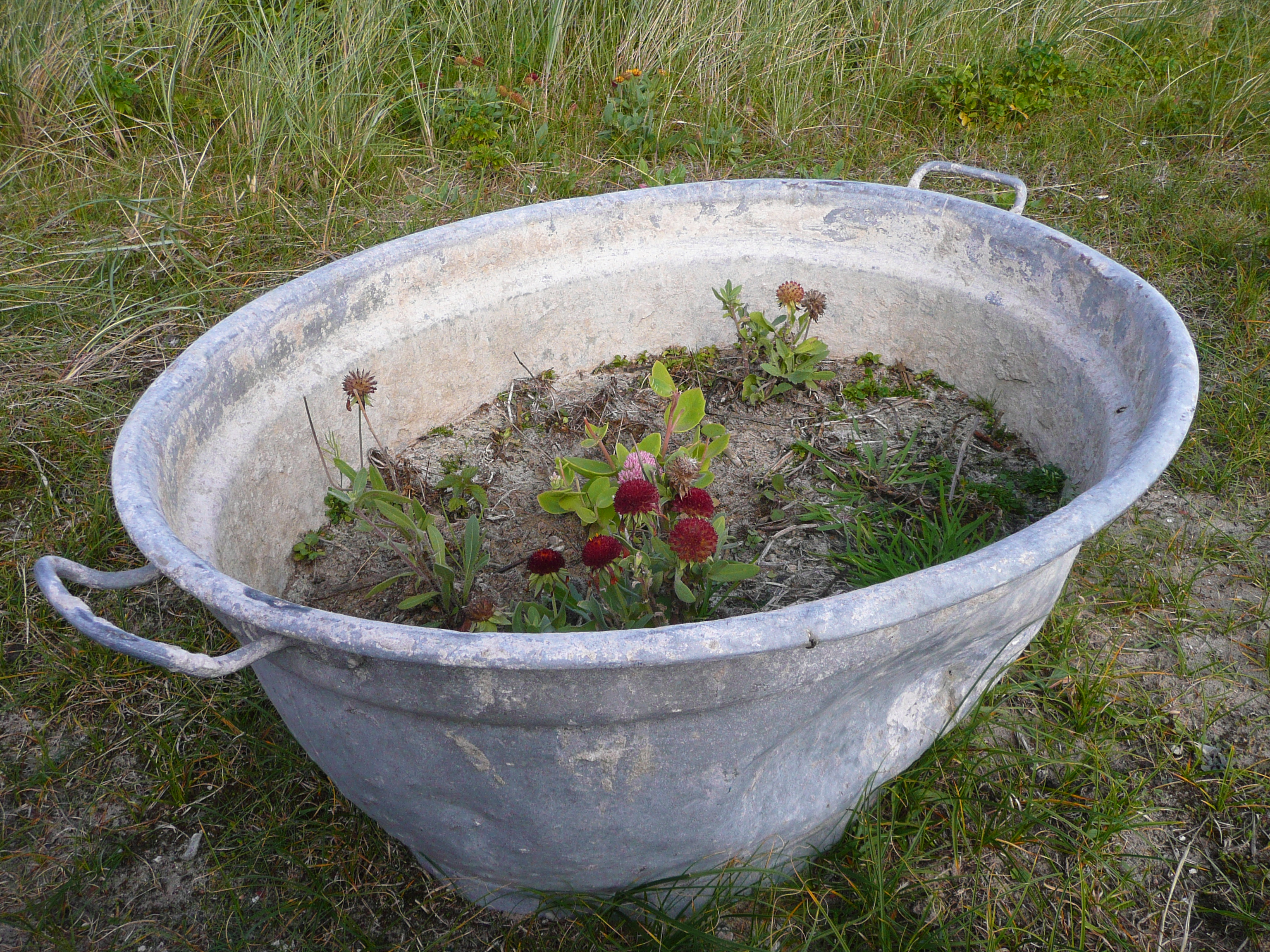 Zinkwanne mit Pflanzen